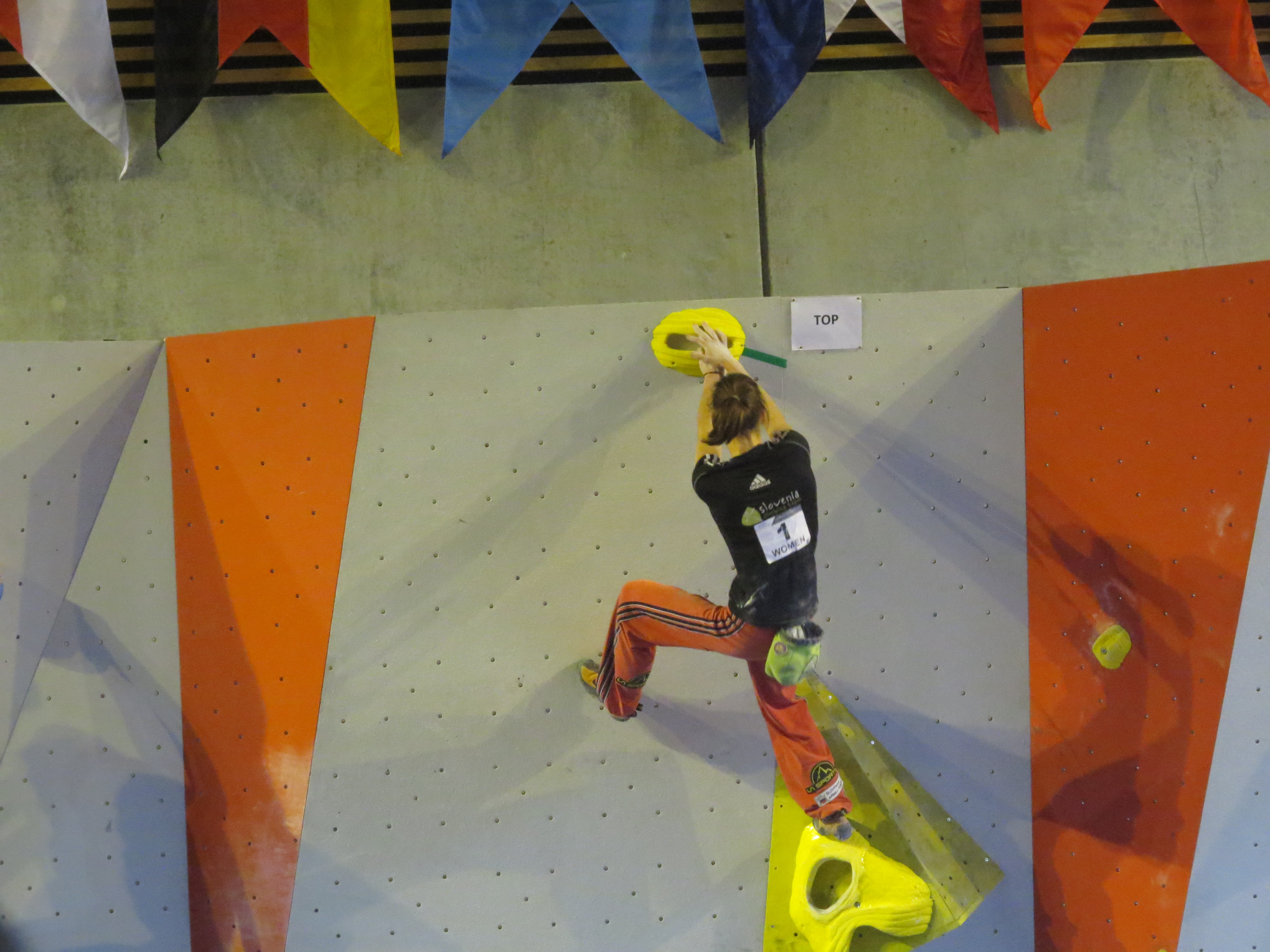 Photo réalisée le 28 mars